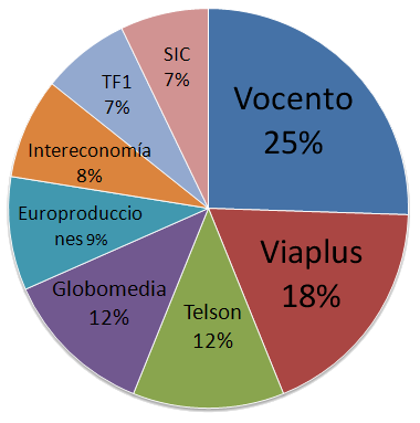 Net TV - Accionariado de 2000 a 2004